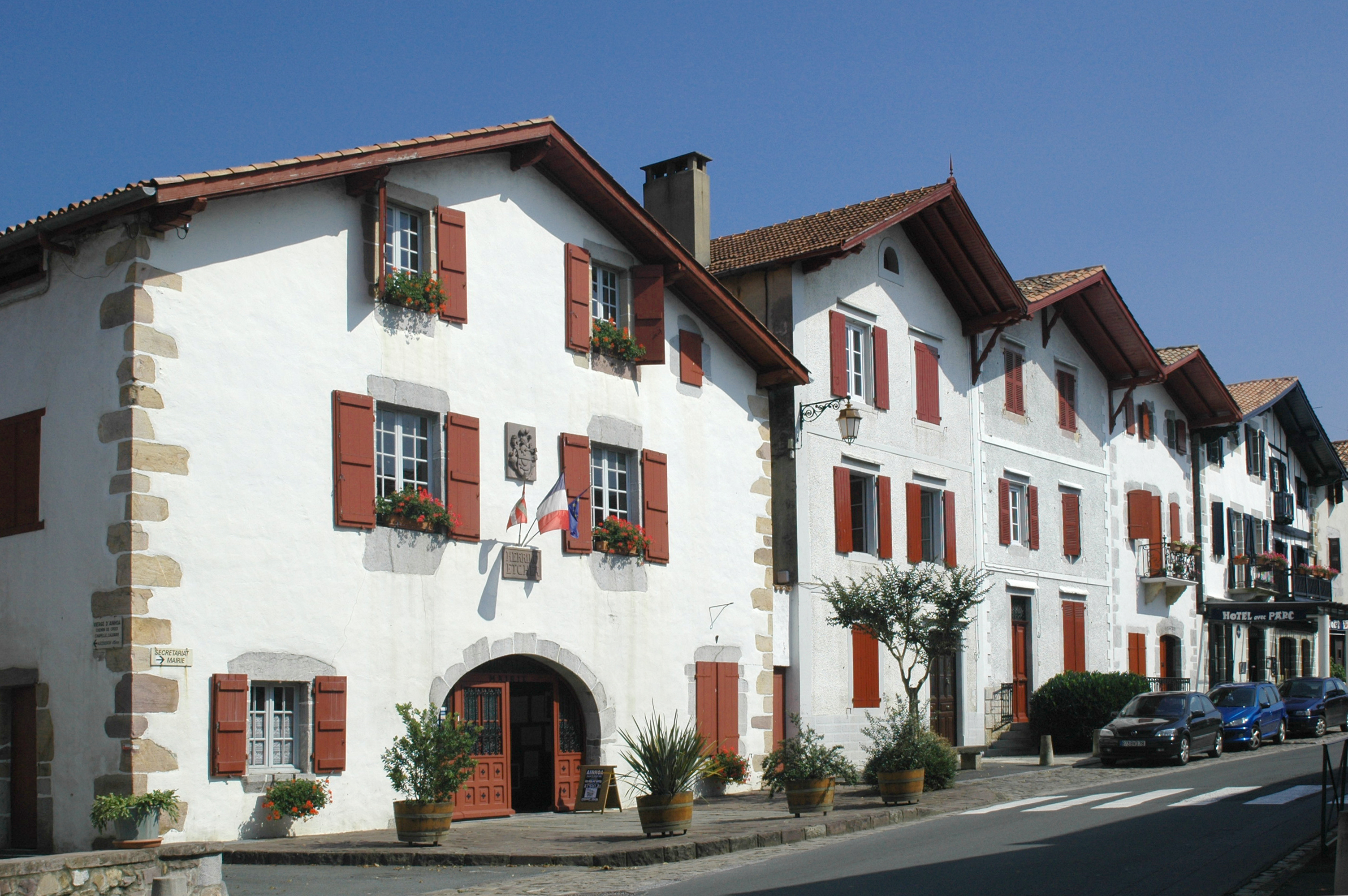 Ainhoa, la rue principale et la mairie, prise le 08/06/06 par Harrieta171